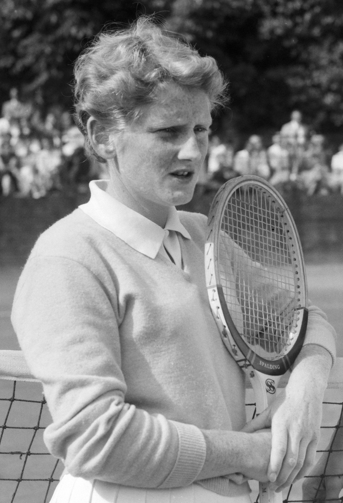 Finale van het internationale tennistoernooi te Hilversum. Links Norma Marsh , rechts Zus Peters-Schmier